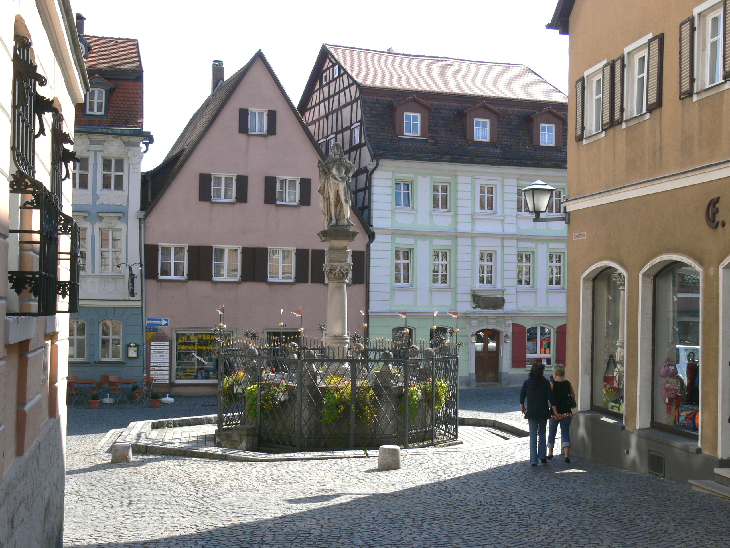 Bad Windsheim. Schöner Brunnen ( 1590 ) am Weinmarkt